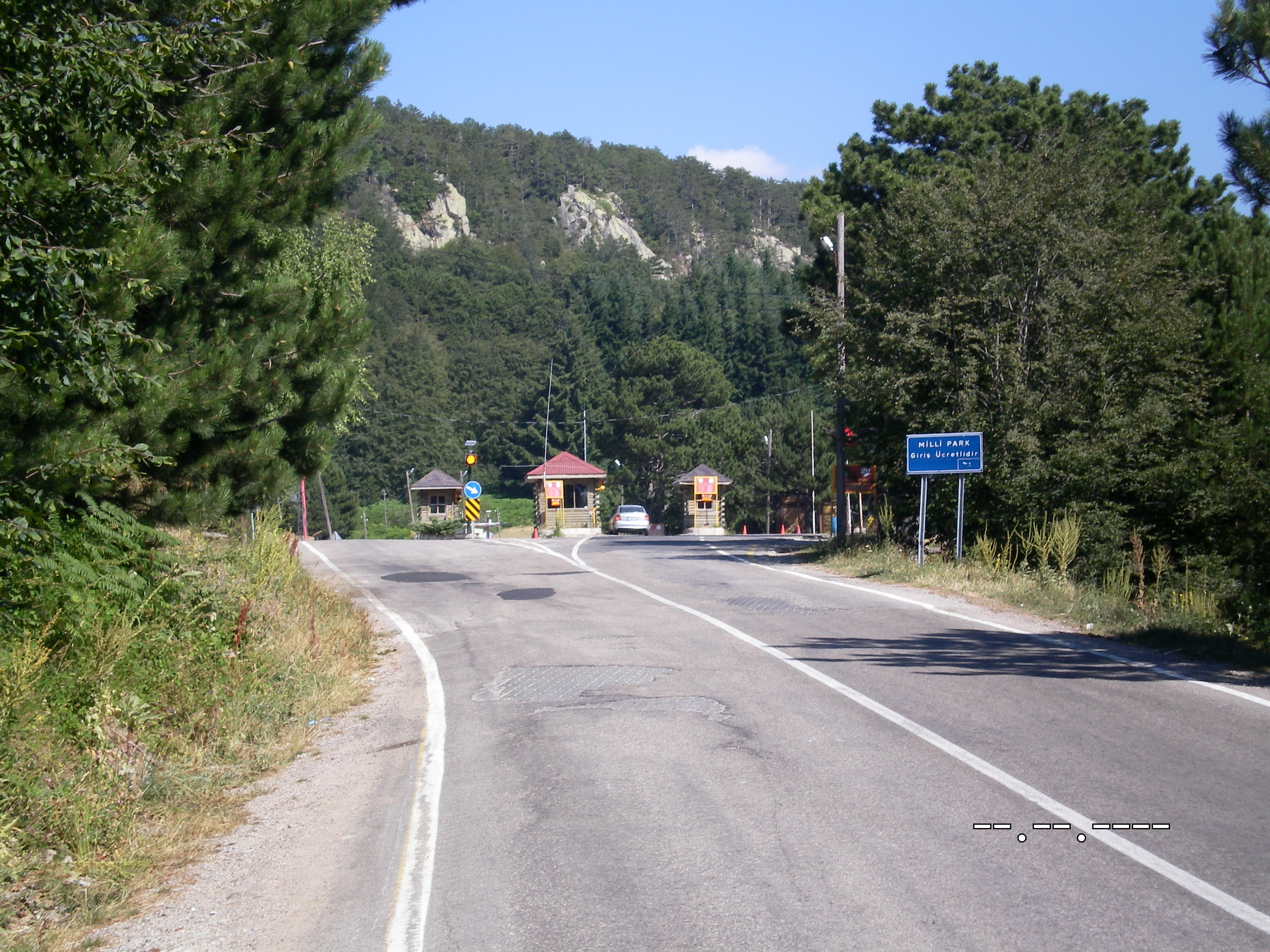 Uludağ Milli Parkı Girişi